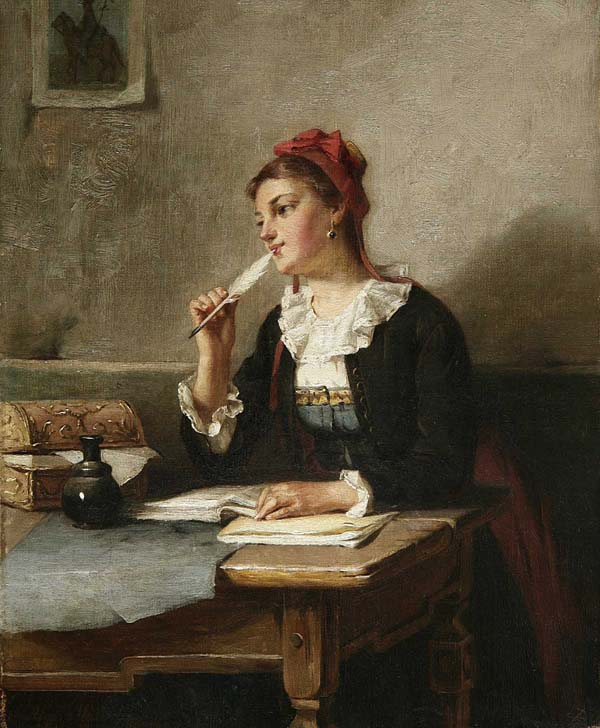 Liebesglück – der Tagebucheintrag. Öl auf Leinwand, 32.5 x 26.5 cm, signiert